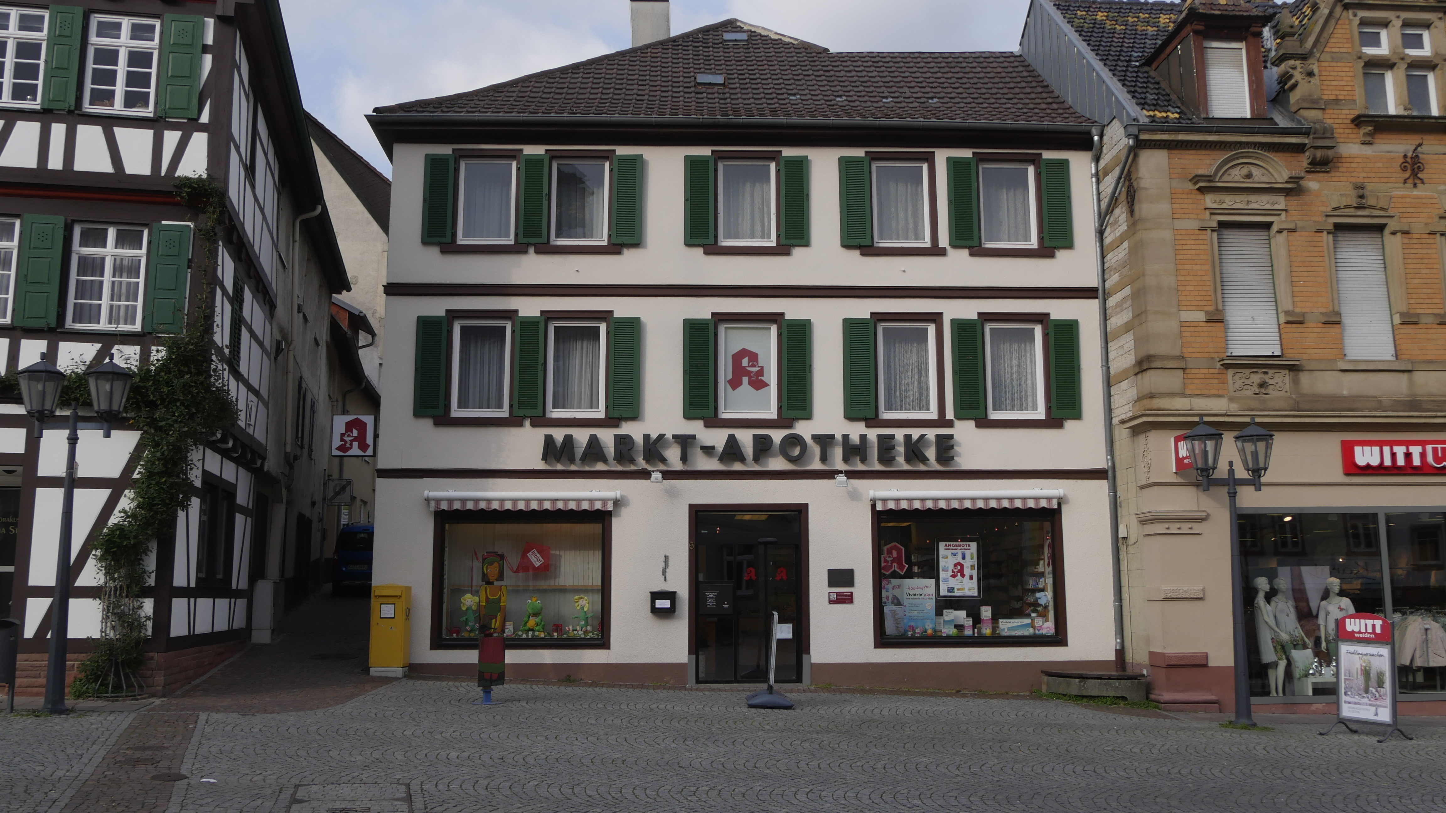 Bild der Markt-Apotheke in Bretten